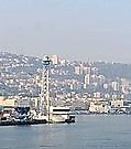 Maják Haifa Lee Breakwater a řídící věž